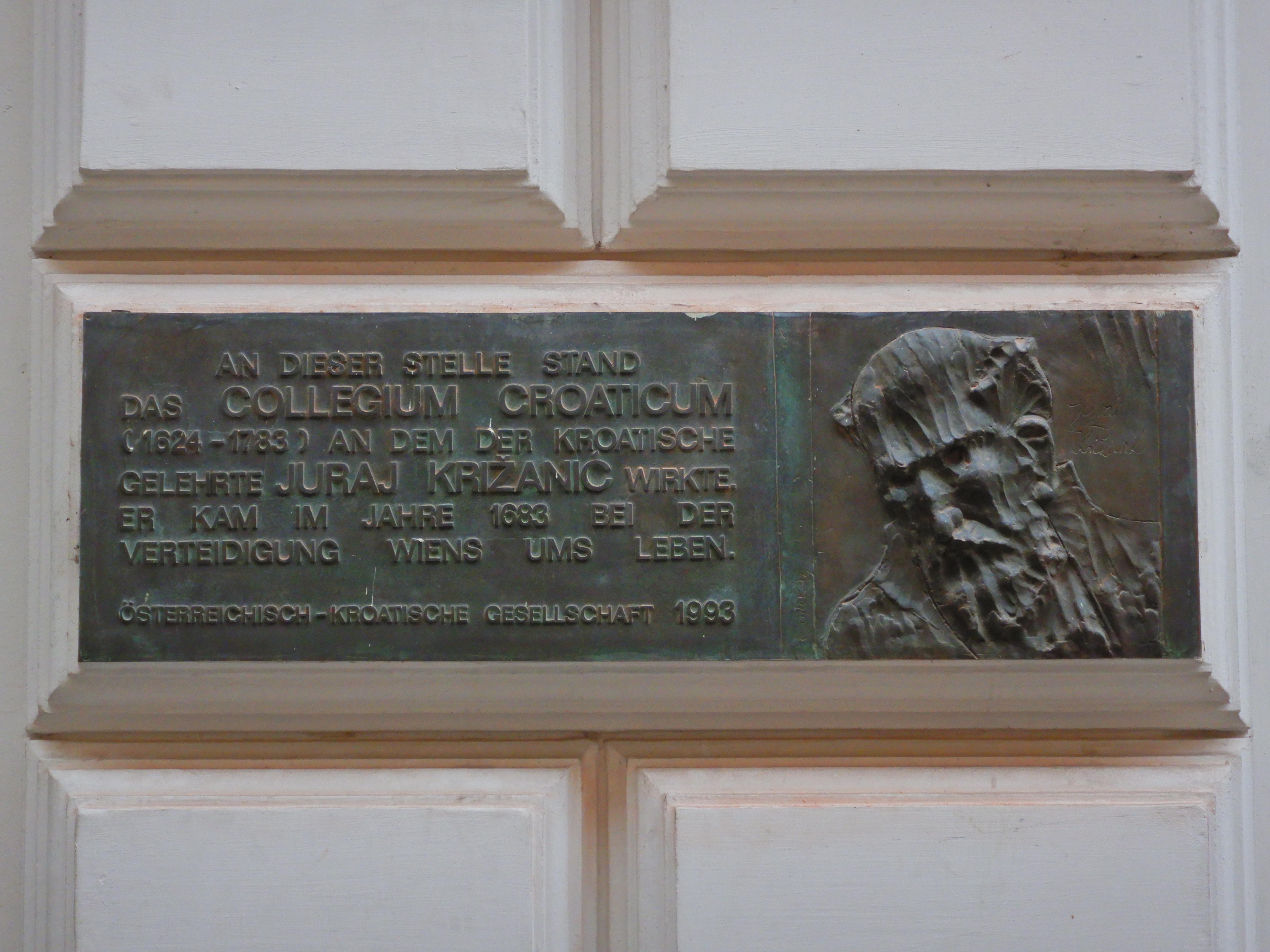 Gedenktafel für Juraj Križanić (Wien, Schönlaterngasse 13)